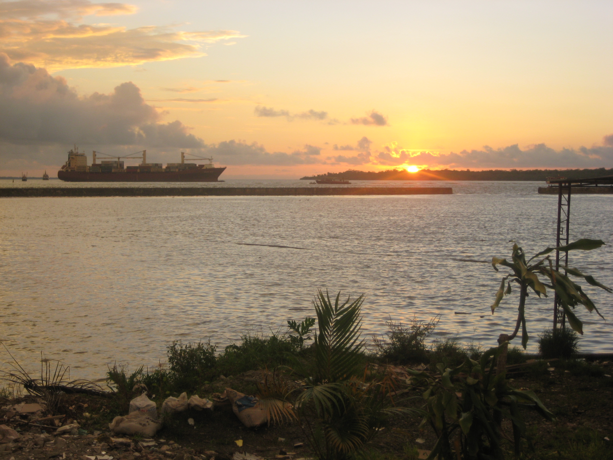 Colombia Buenaventura avond